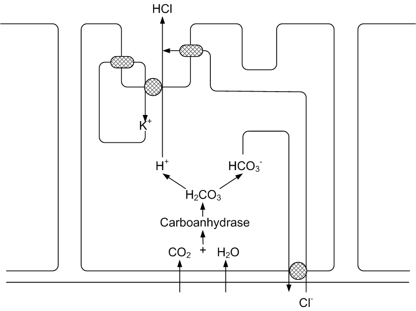 Magensäureproduktion